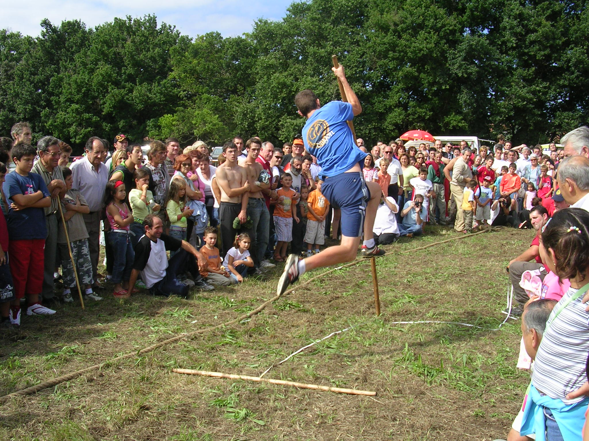 Deportes populares en el Día de las instituciones en Puente San Miguel